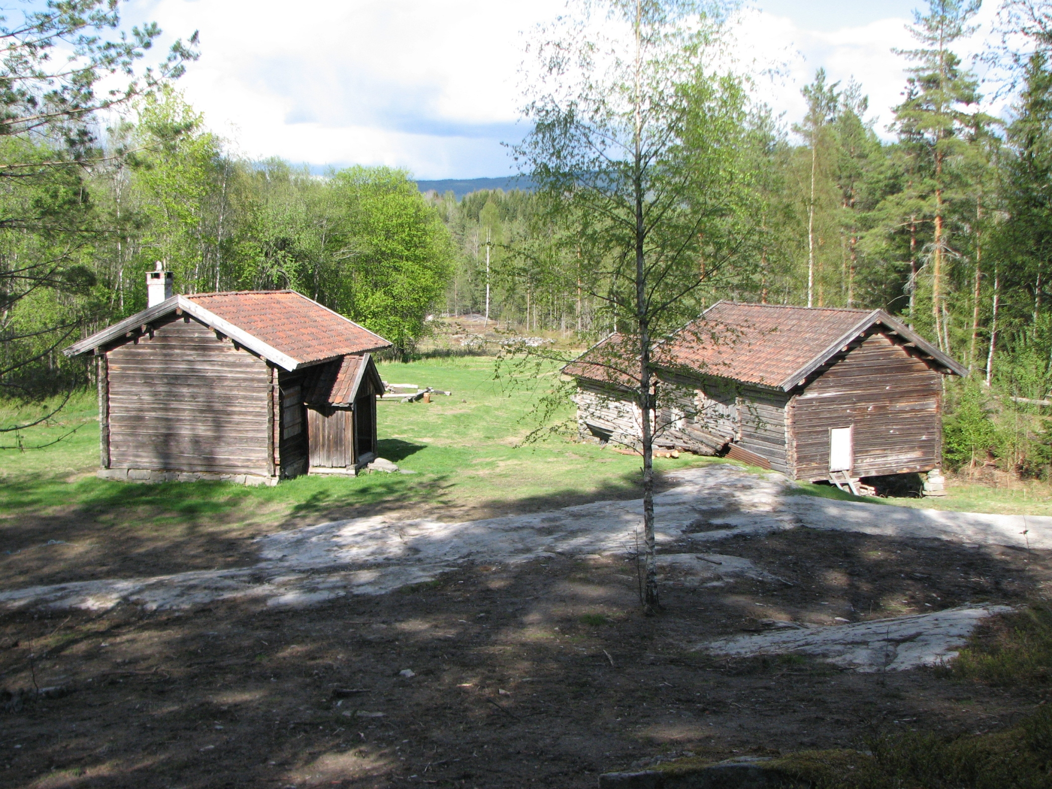 Mølleplassen på tusenårsstedet Kvennøya i Bø kommune, Telemark.